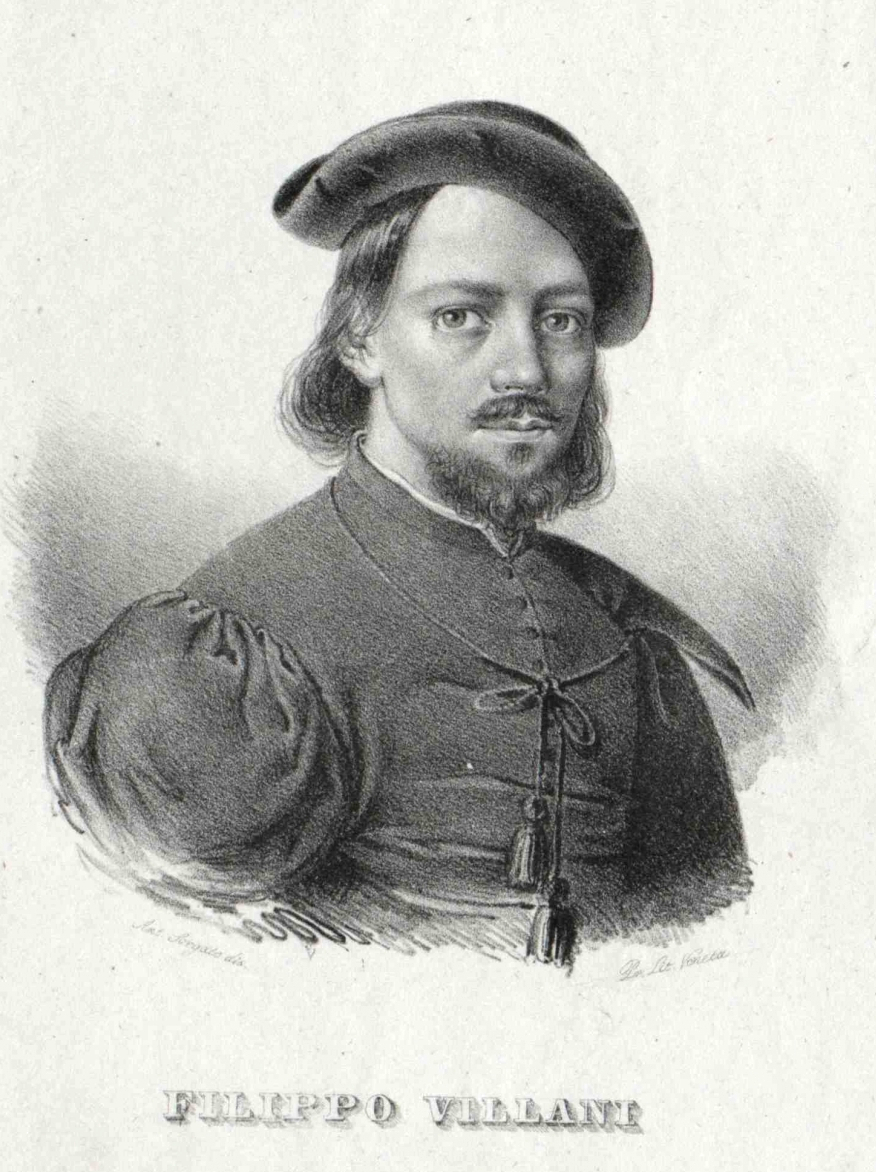 Villani, Filippo (lebte nach 1300 - 1400)